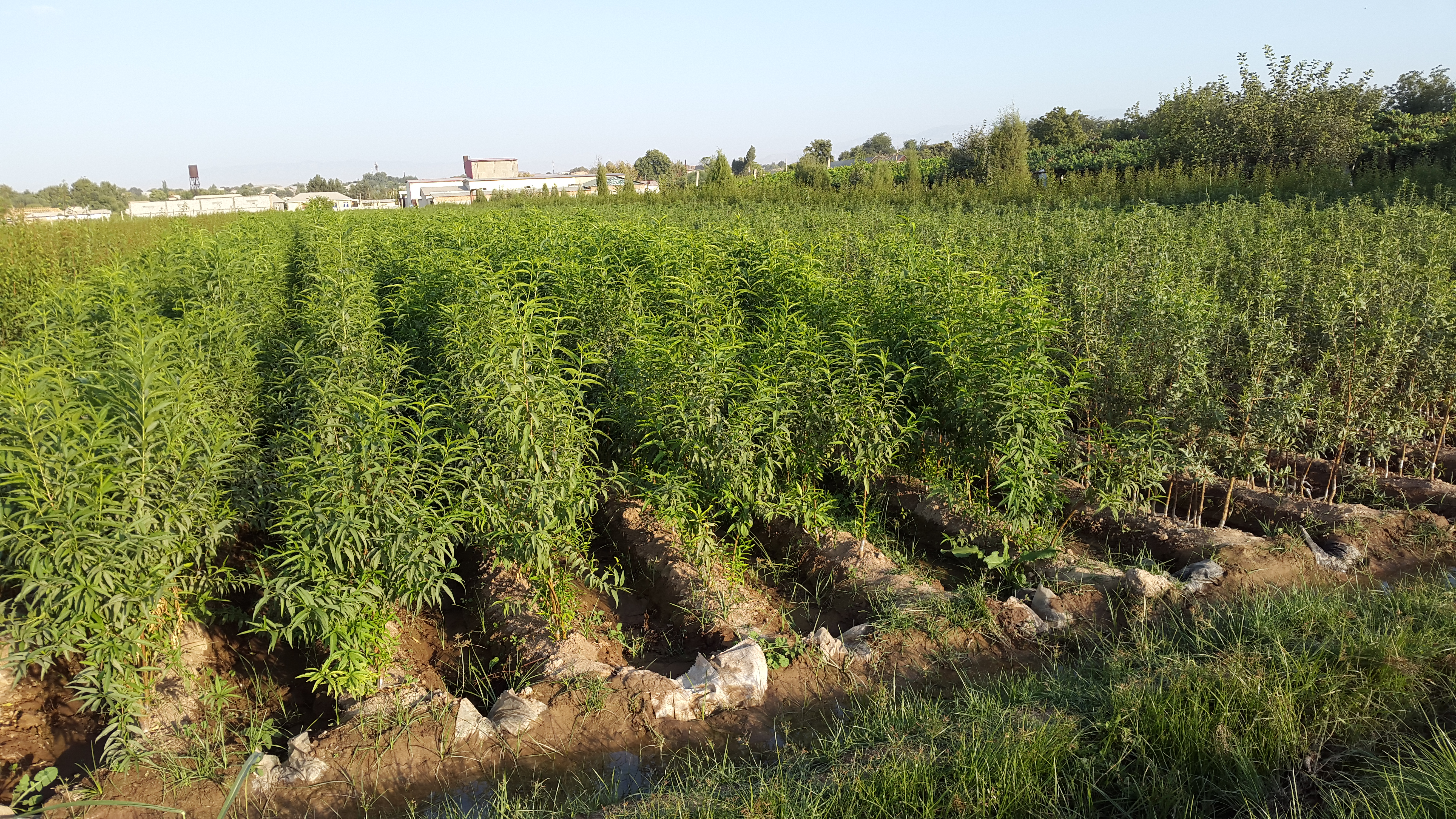 Плодовый питомник в Денаусском районе Сурхандарьинской области Узбекистана